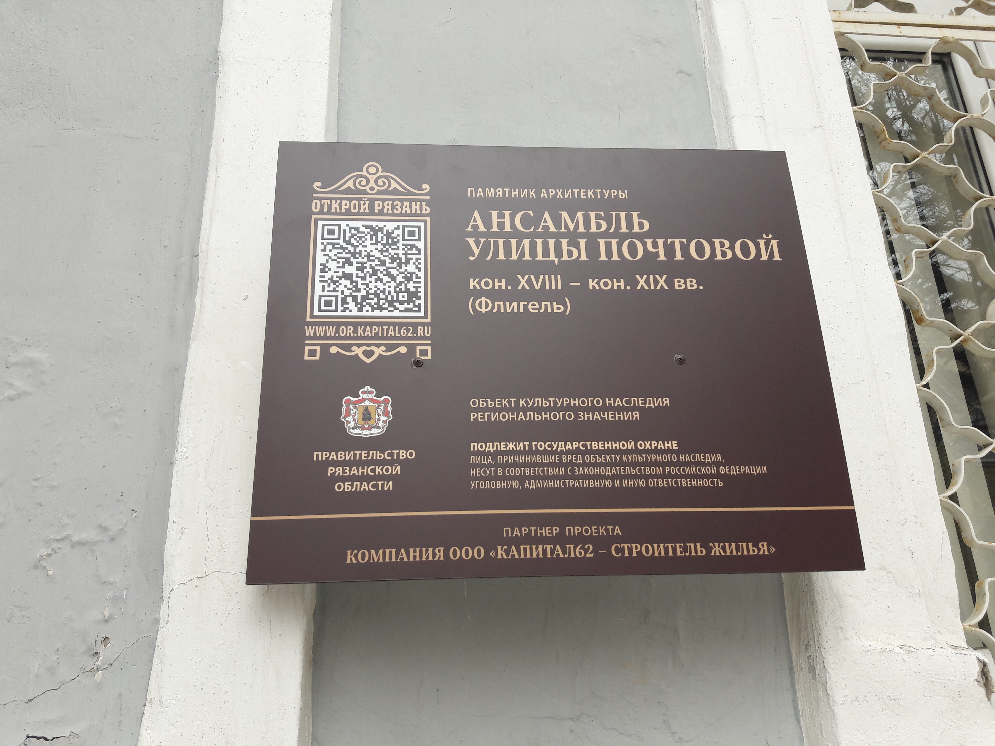 Доска